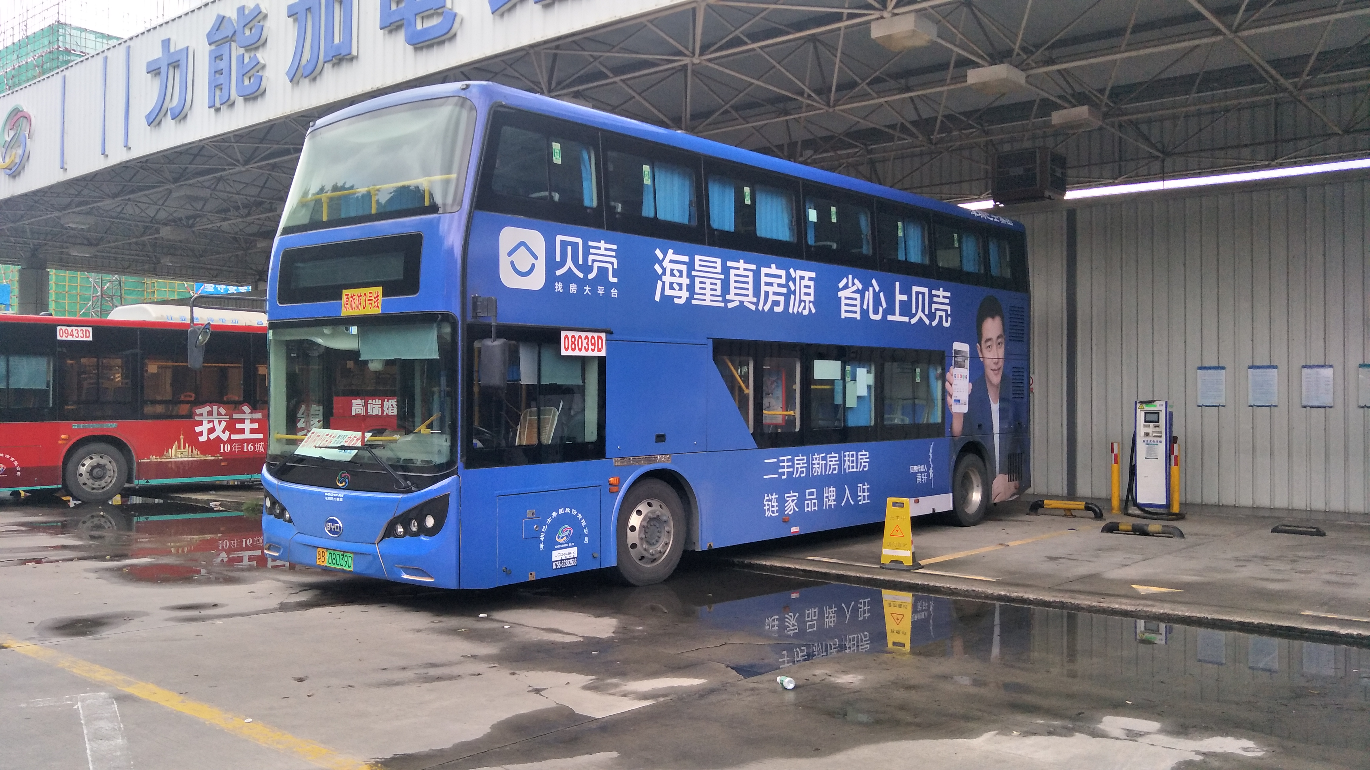 在深圳清水河总站的深圳巴士集团所有的比亚迪K8S双层巴士